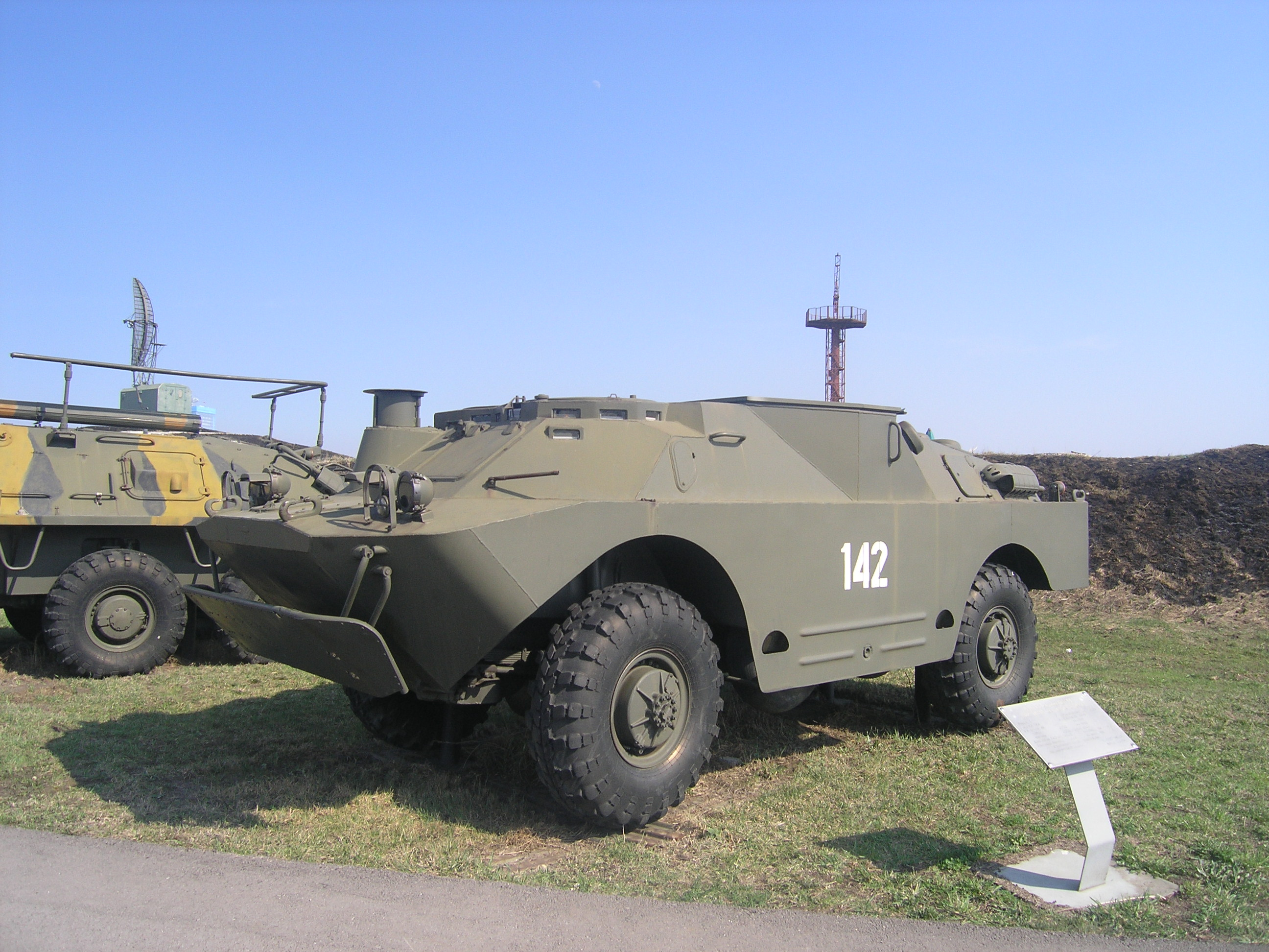 Боевая машина 9П133 противотанкового-ракетного комплекса ПТРК 9K14П Малютка-П на базе БРДМ-2